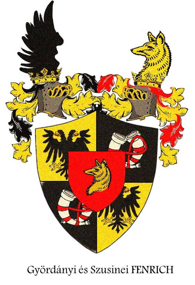 Stemma della famiglia Fenrich de Gjurgjenovac